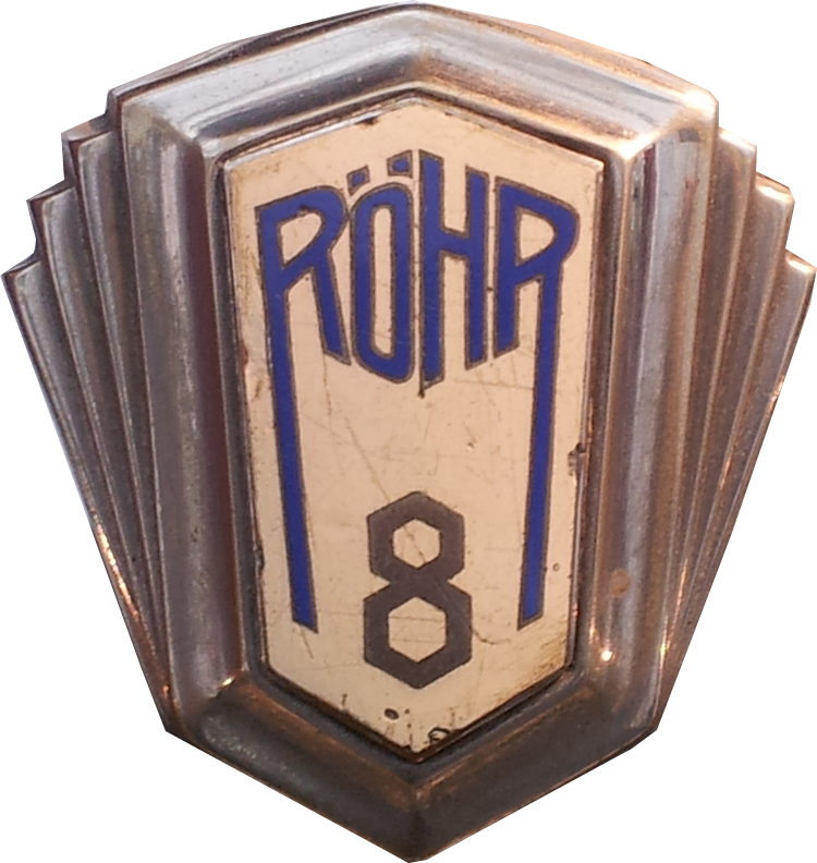 Logo des Röhr 8, Aufnahme aus dem Verkehrsmuseum Dresden